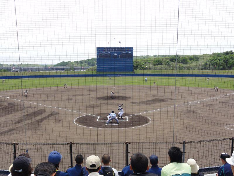 野球場風景